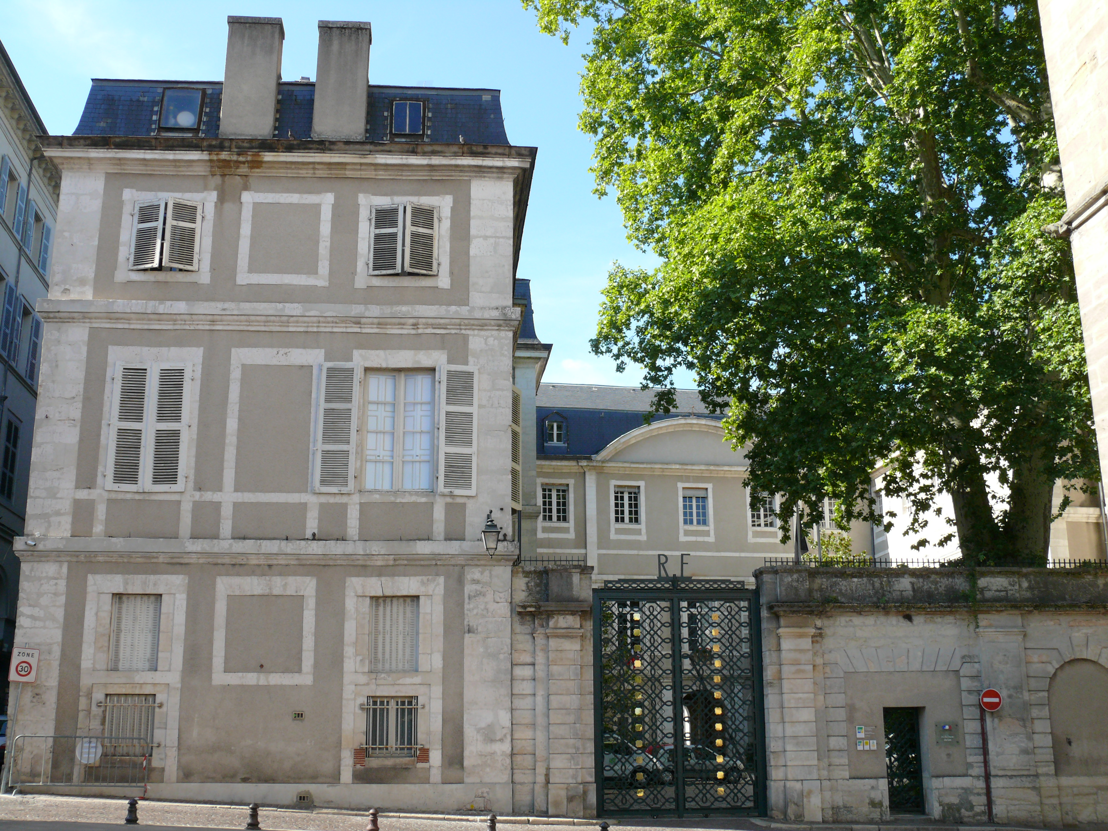 Cahors - Préfecture du Lot, entrée sur la place Jean-Jacques-Chapou